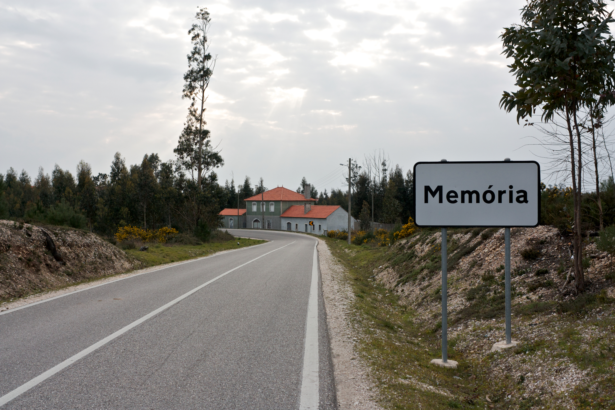 Memória, uma terra que não se esquece. [Estrada Nacional 350 • Km 21]